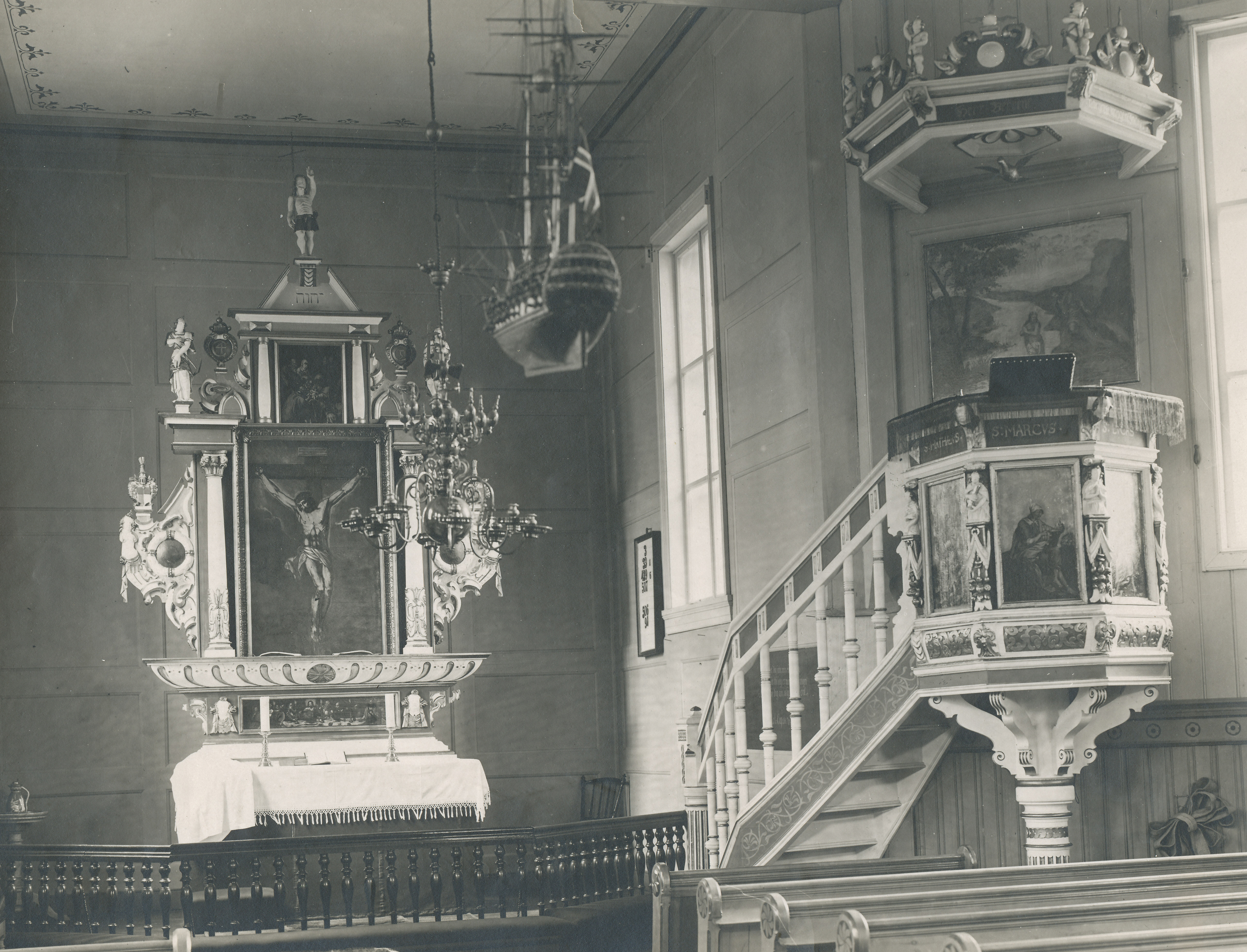 Interiør fra Hospitalskirken i Trondheim. Bygget i 1705. Se også artikkel om "Kirkene våre" i Adresseavisen 4. desember 1965 av tidligere Byarkivar Løkhaug. Ukjent fotograf (mulig E. Olsen), ukjent år.